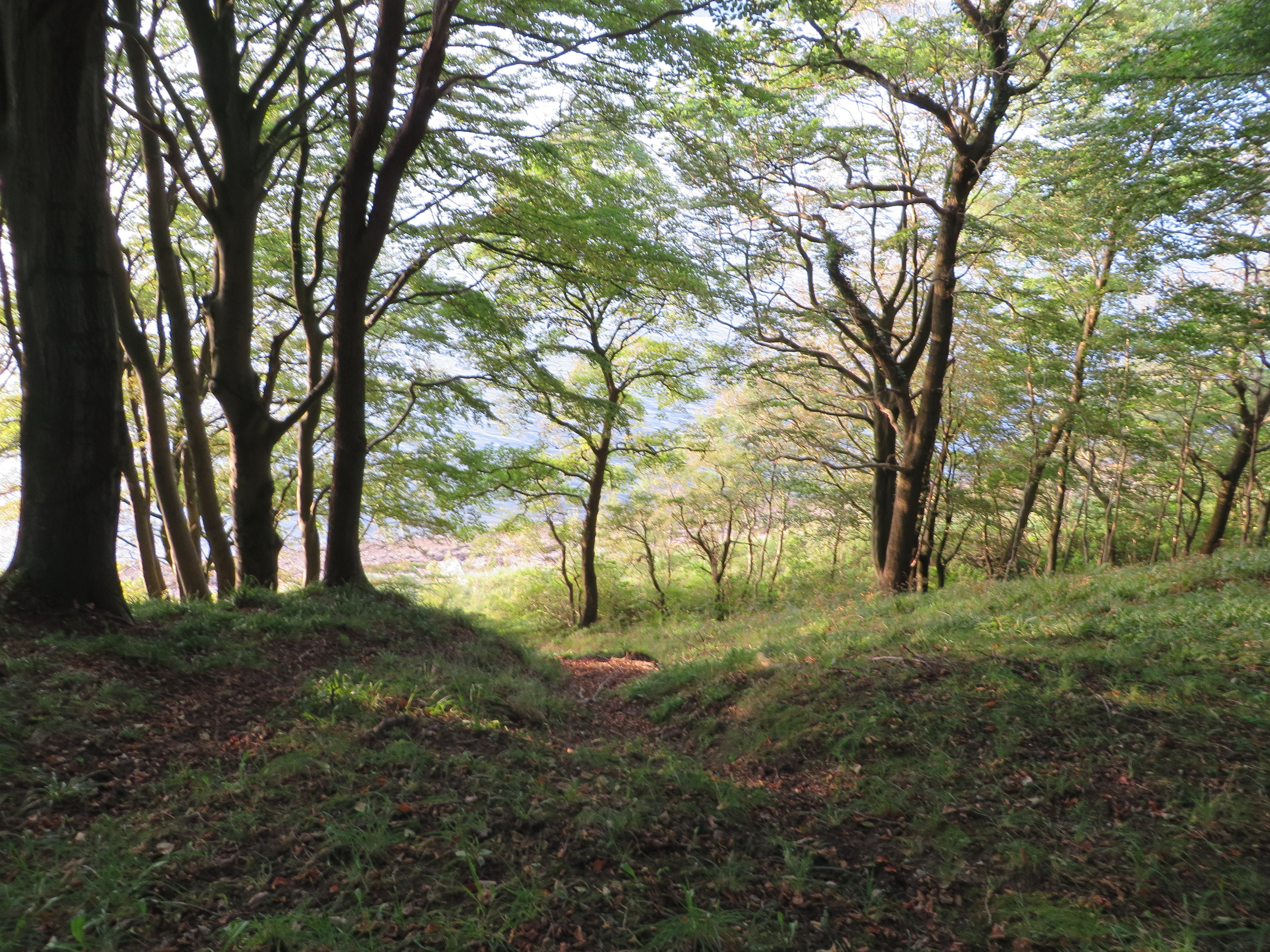 Twedter Mark, Fördehang runter zur Strandkante (Mürwik September 2014), Bild 04